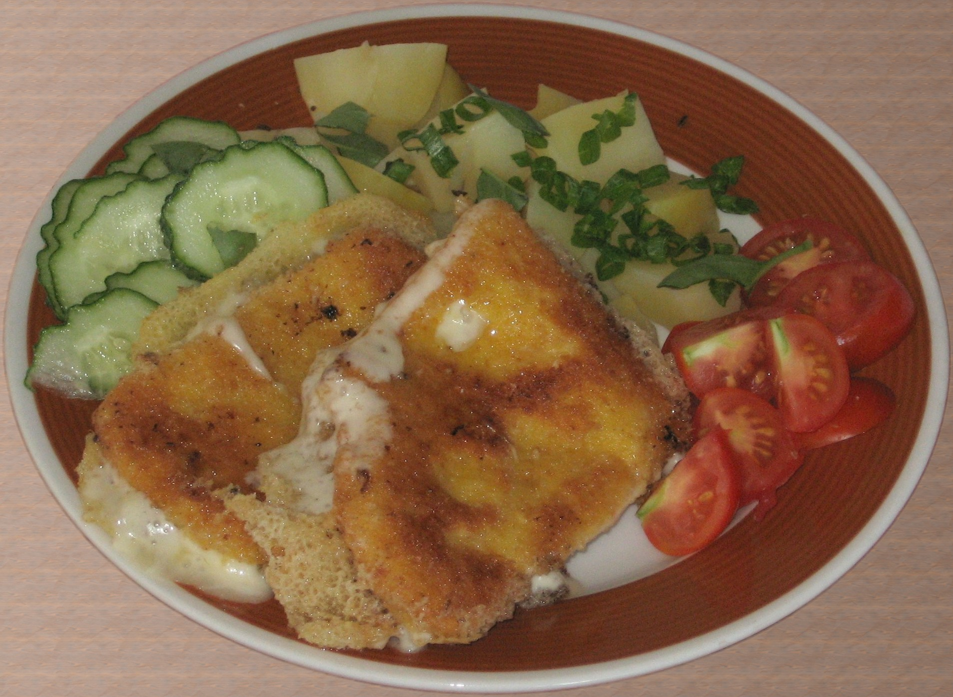 smažený sýr na talíři